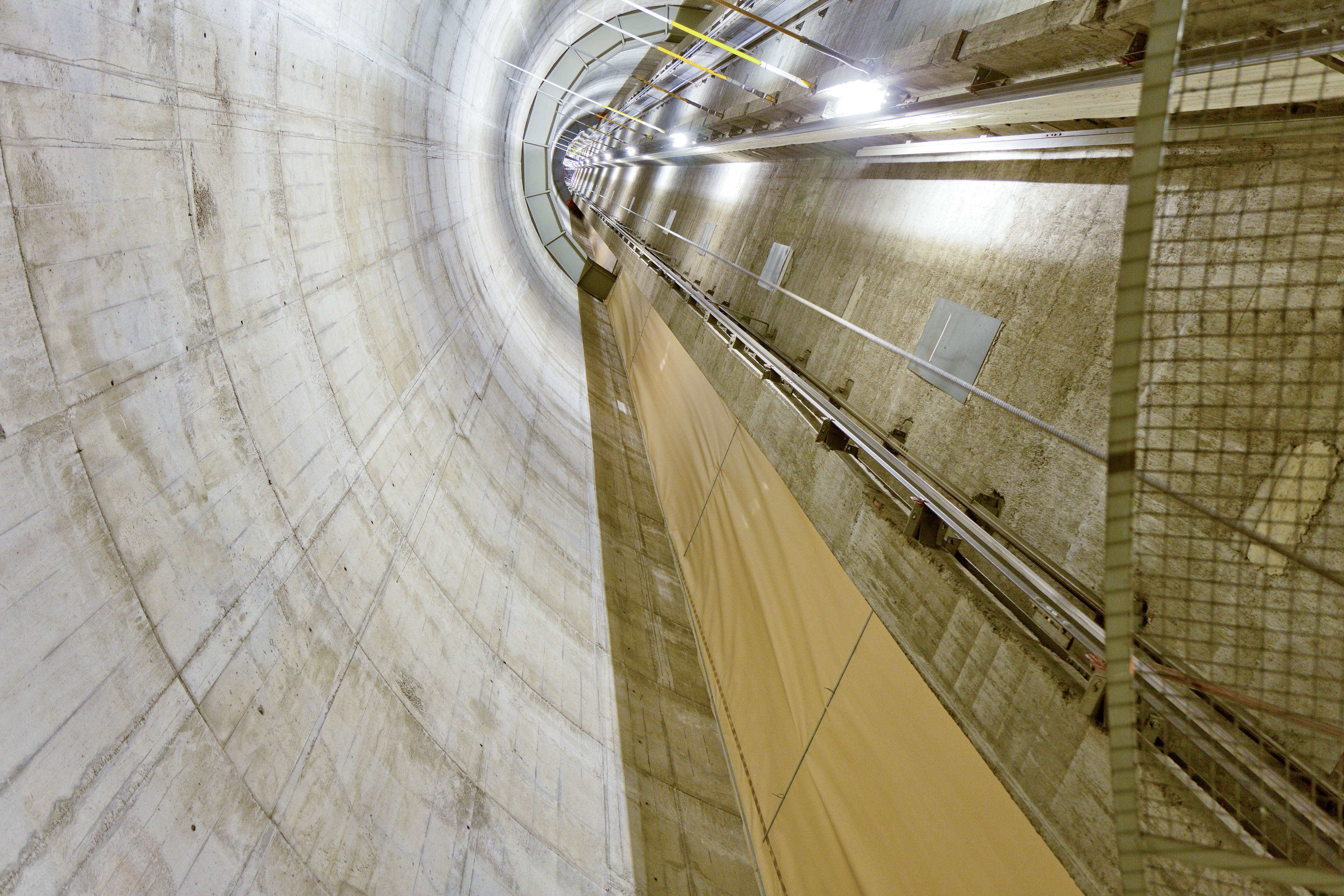 Wikipedia im Landtag – Bayern 17. bis 19. Juli 2012 in MünchenDieses Foto wurde im Rahmen des Projektes „Wikipedia im Landtag“ erstellt.